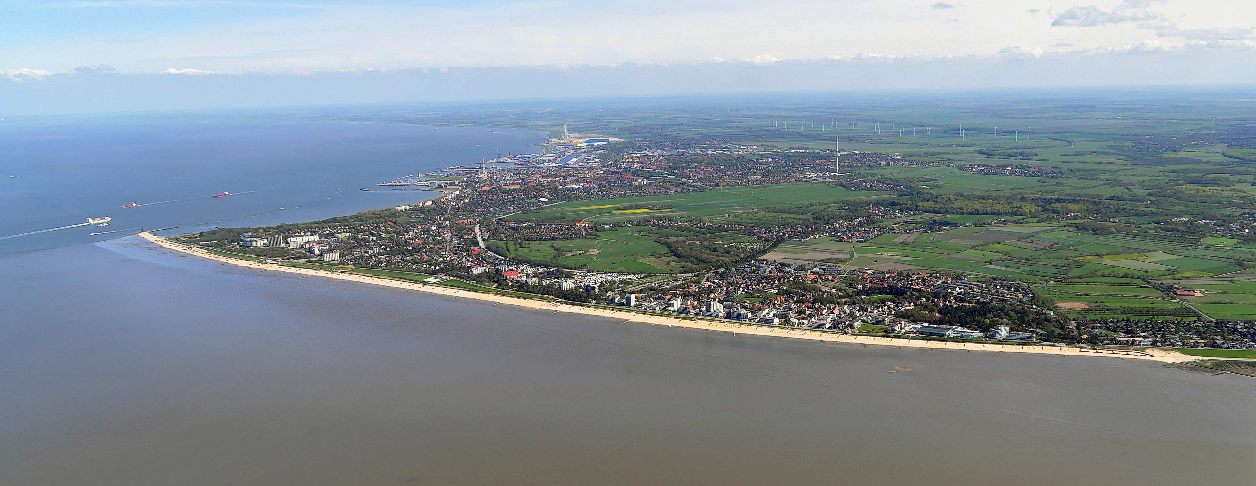 Luftbilder von der Nordseeküste 2012-04 Dieses Foto entstand aufgrund eines Projektes, das von Wikimedia Deutschland e. V. gefördert wurde. Im Rahmen des „Community-Projektbudgets“ sollen Luftbilder u.a. von Inseln, Halligen, Sanden und Küstenstädten der deutschen Nordseeküste angefertigt werden. Das Projekt „Fotoflüge“ wurde im September 2011 begonnen.